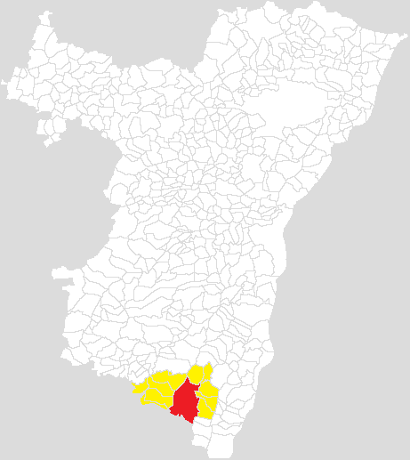 Communauté de communes de Sélestat